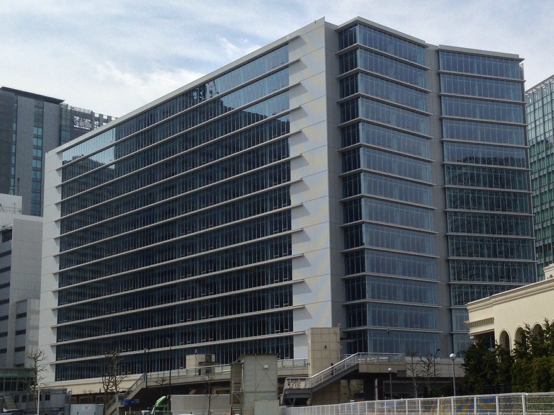 清水建設のみなとみらい46街区（ジャックモール跡地）賃貸オフィスビル計画「横浜アイマークプレイス」。建物全体の様子を遠方（富士ゼロックスR&Dスクエア付近）から撮影。建物の外観はほぼ完成しており、開業に向けて準備が進められているものと思われる。2014年5月開業予定。